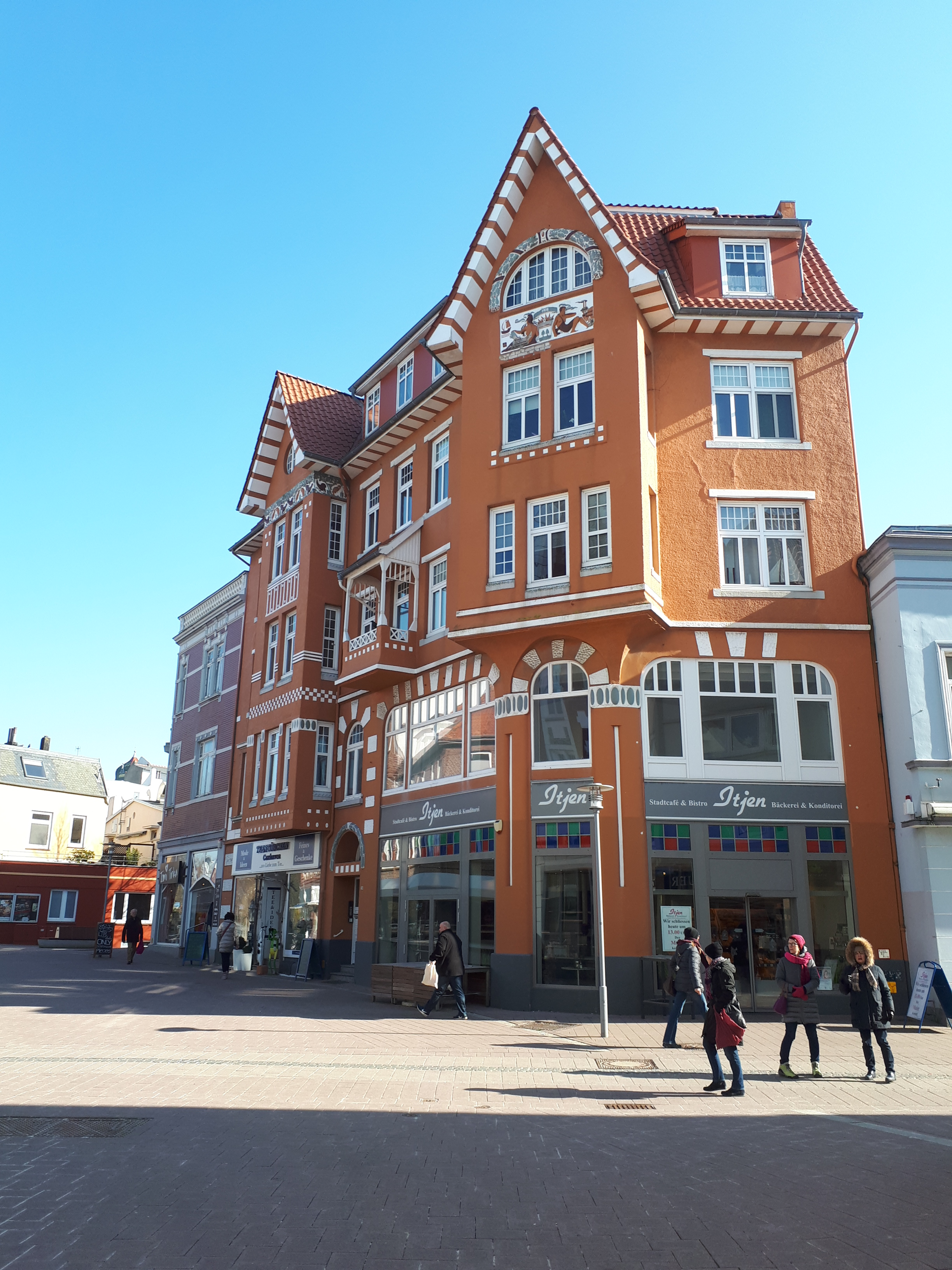 Cuxhaven Nordersteinstraße 24